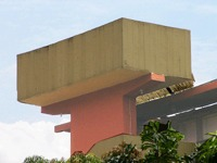 Foto farita de Luis Guillermo Restrepo Rivas, kiun la aŭtoro liveras por publika kaj libera uzado far iu ajn homo aŭ maŝino.